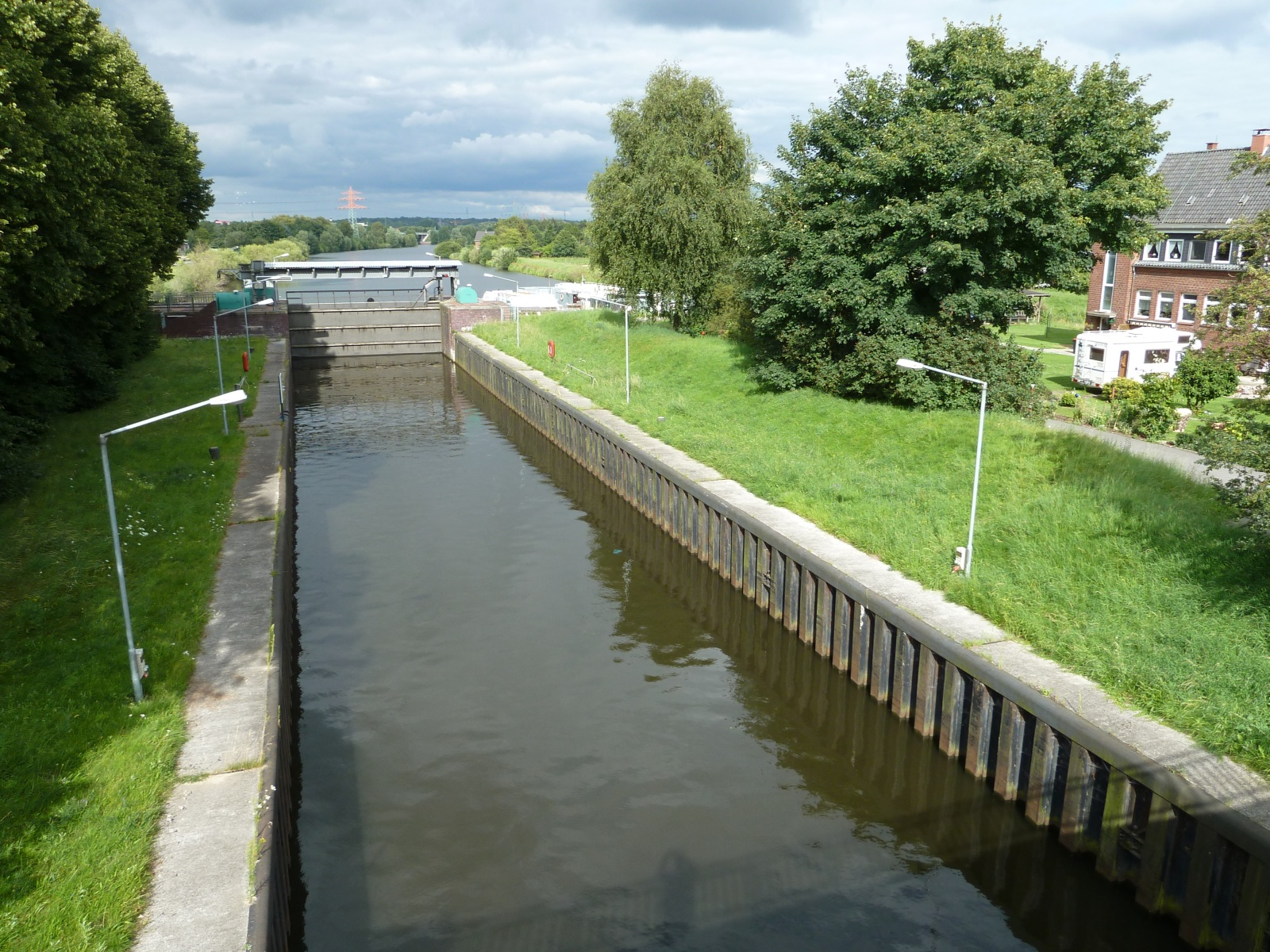 Krapphofschleuse